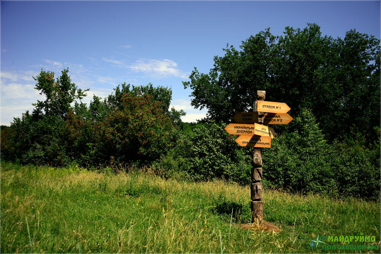 фотографії зроблені під час велоекскурсії, яку організувала ГО "ВелоПолтава" спільно з ПМЕГО «МАМА-86-Полтава»